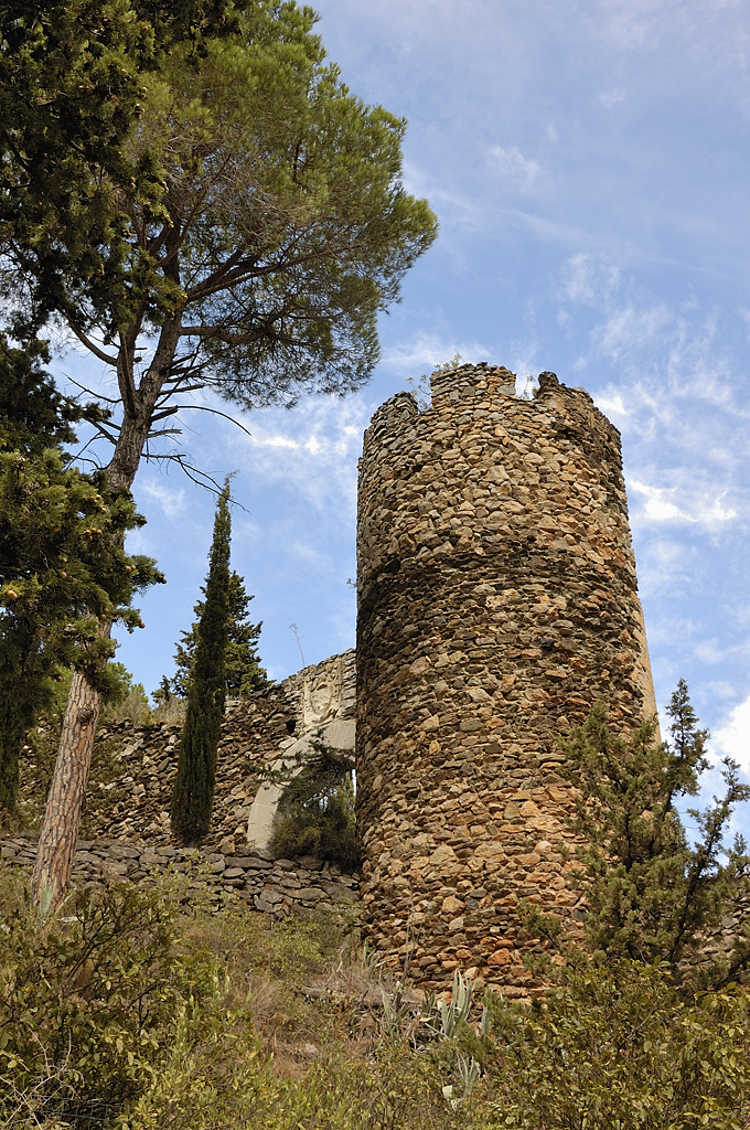 Castelnou